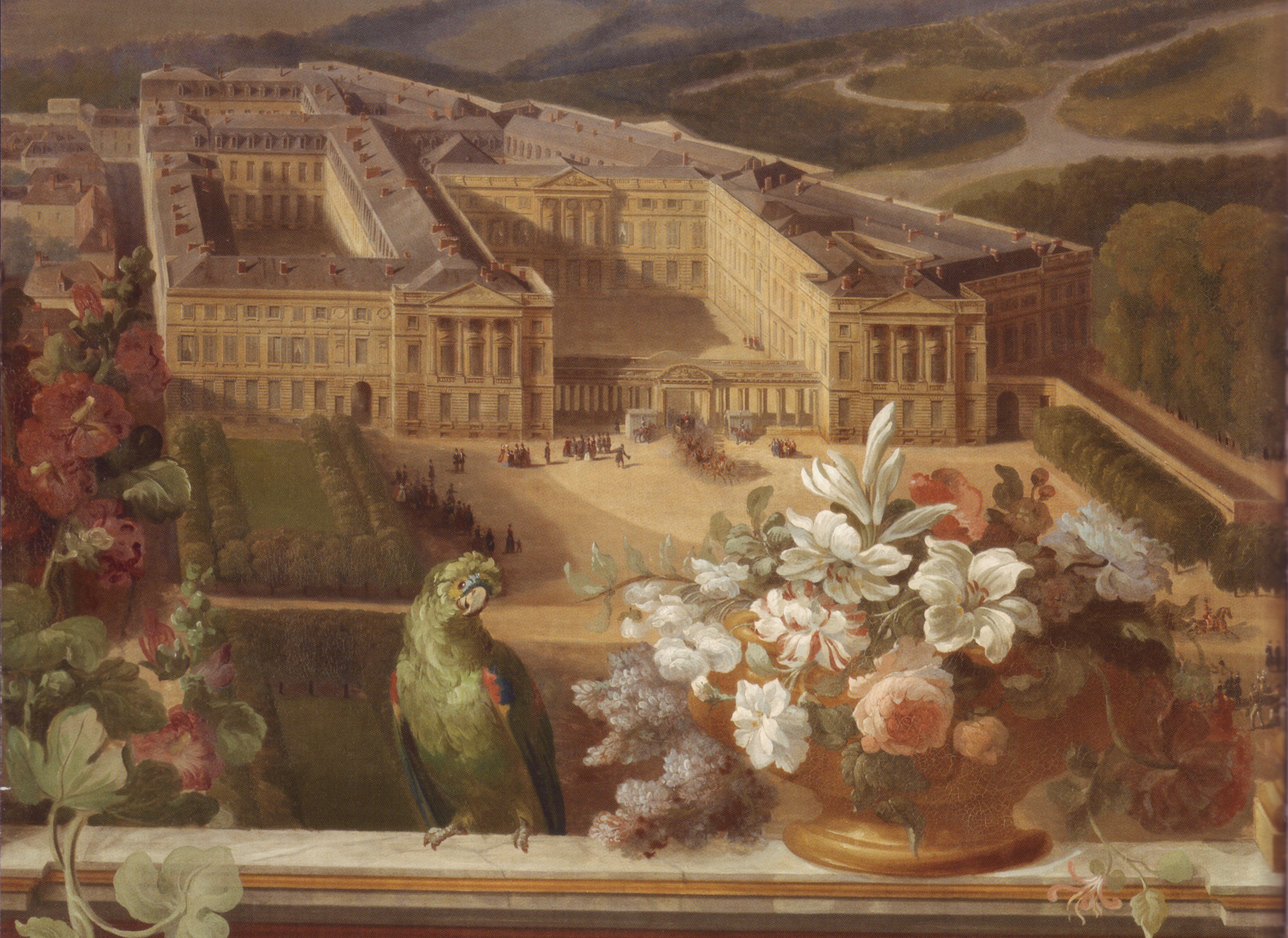 Ansicht des Schlosses Compiègne im Jahr 1842